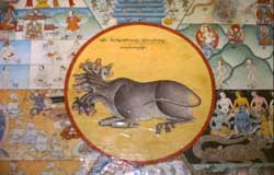 Teil eines Bön-"Lebensrades" (Rad des Werdens und Vergehens) Foto: A. Gruschke (Freiburg)